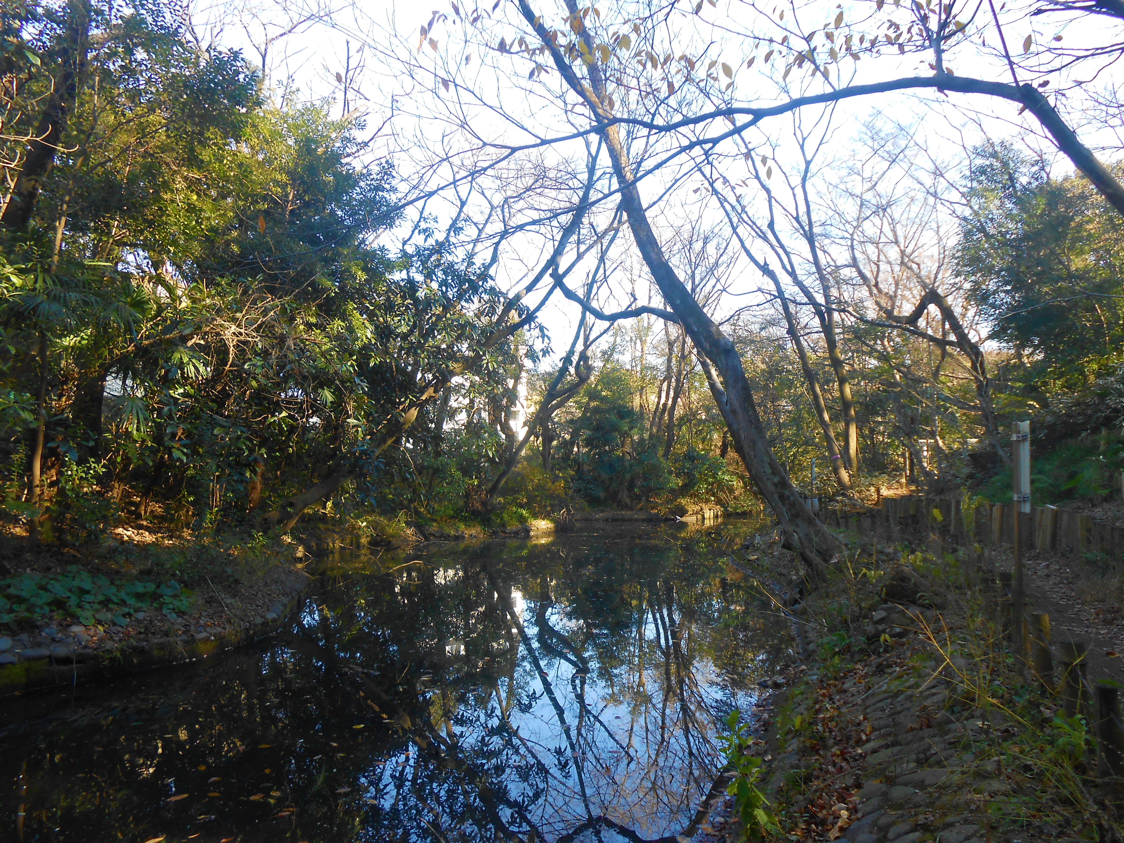 占春園の池